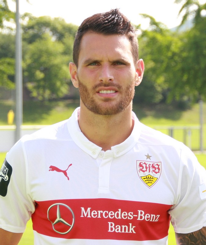 Markus Obernosterer beim offiziellen Fototermin des VfB II. Aufgenommen von